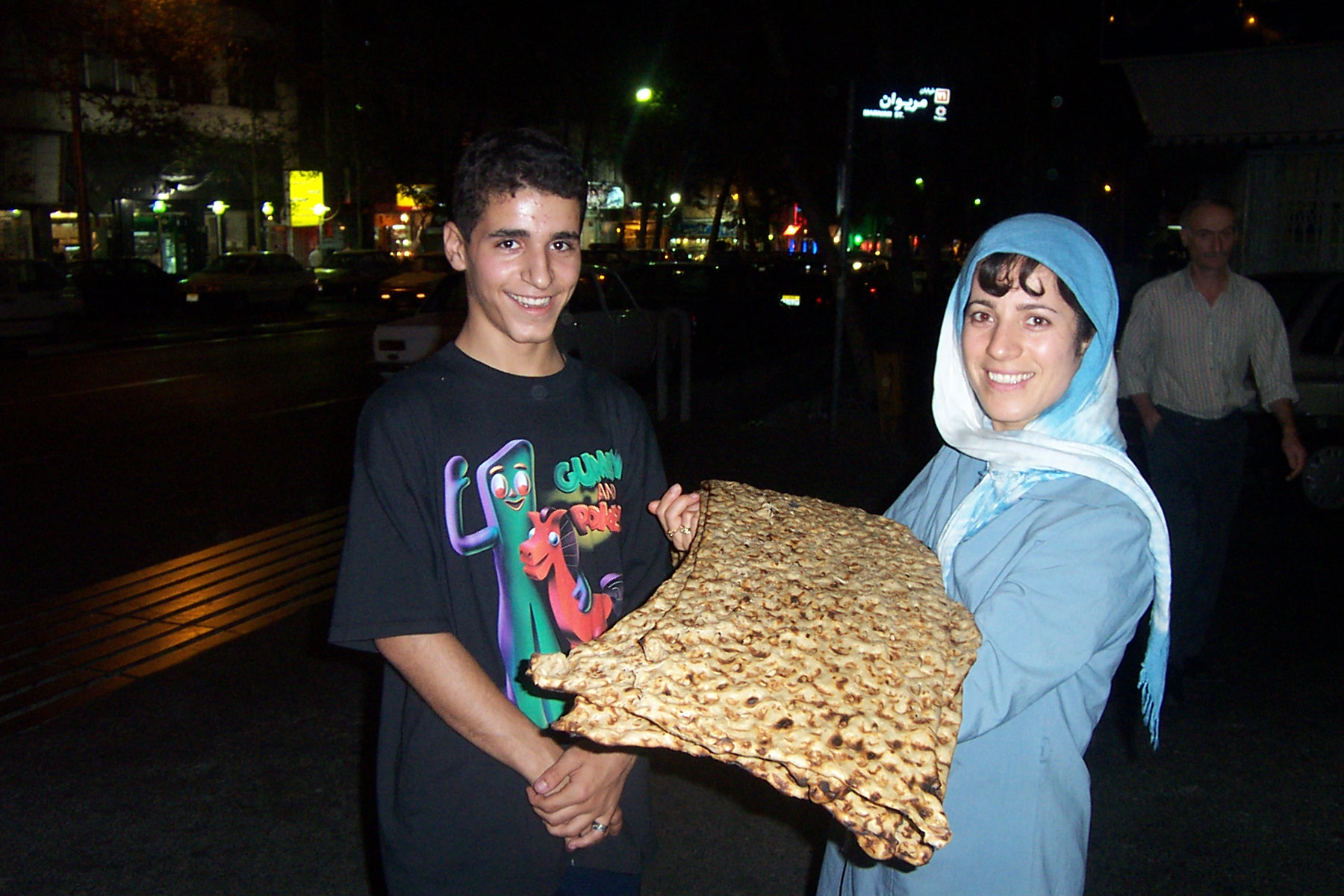 1106. Pouria Ensie. Sangak